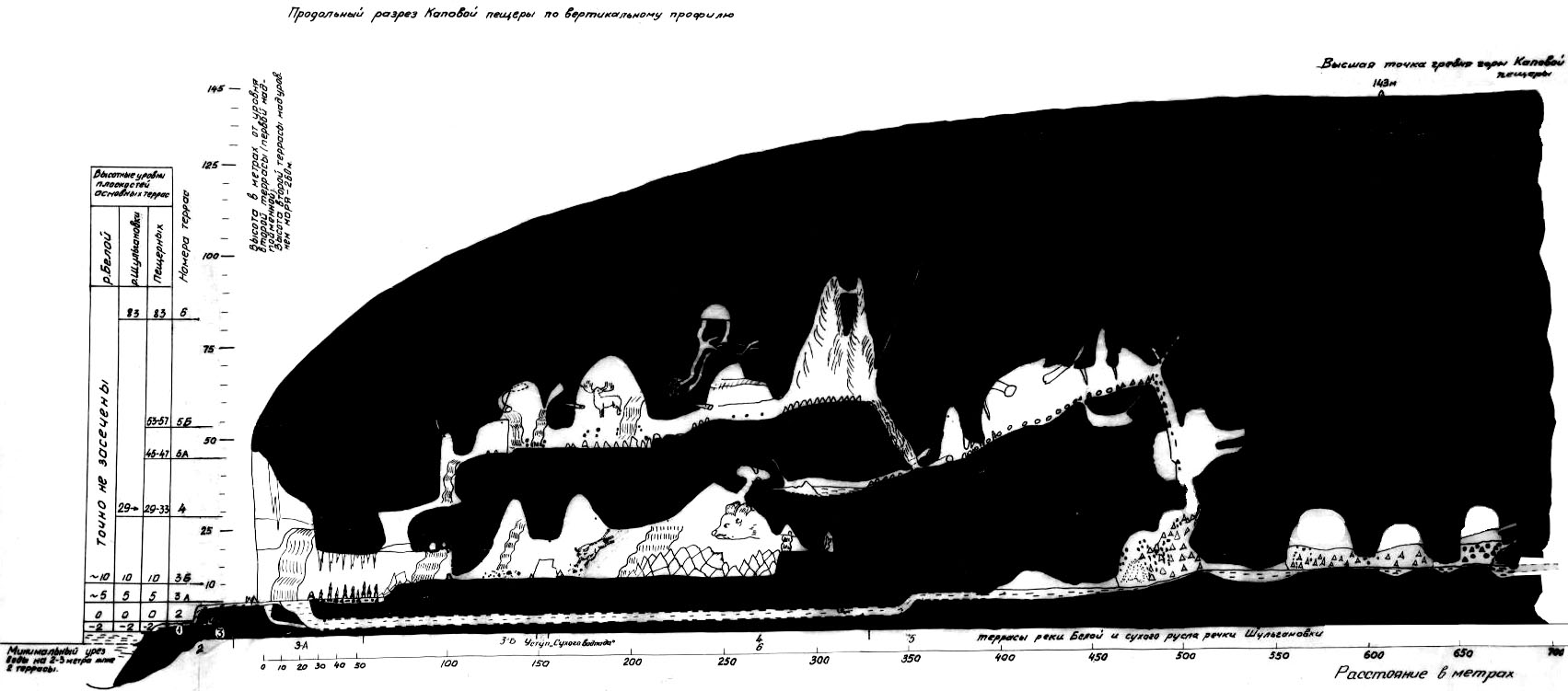 Rusiyanın Başqırdıstan ərazisində yerləşən karst mağarası. Ağidel çayı sahilində, eyni adlı Şulqan-Daş qoruğu ərazisində yerləşir. Mağara ibtidai icma quruluşu dövrünə aid (paleolit) qayaüstü rəsmləri ilə məşhurdur.